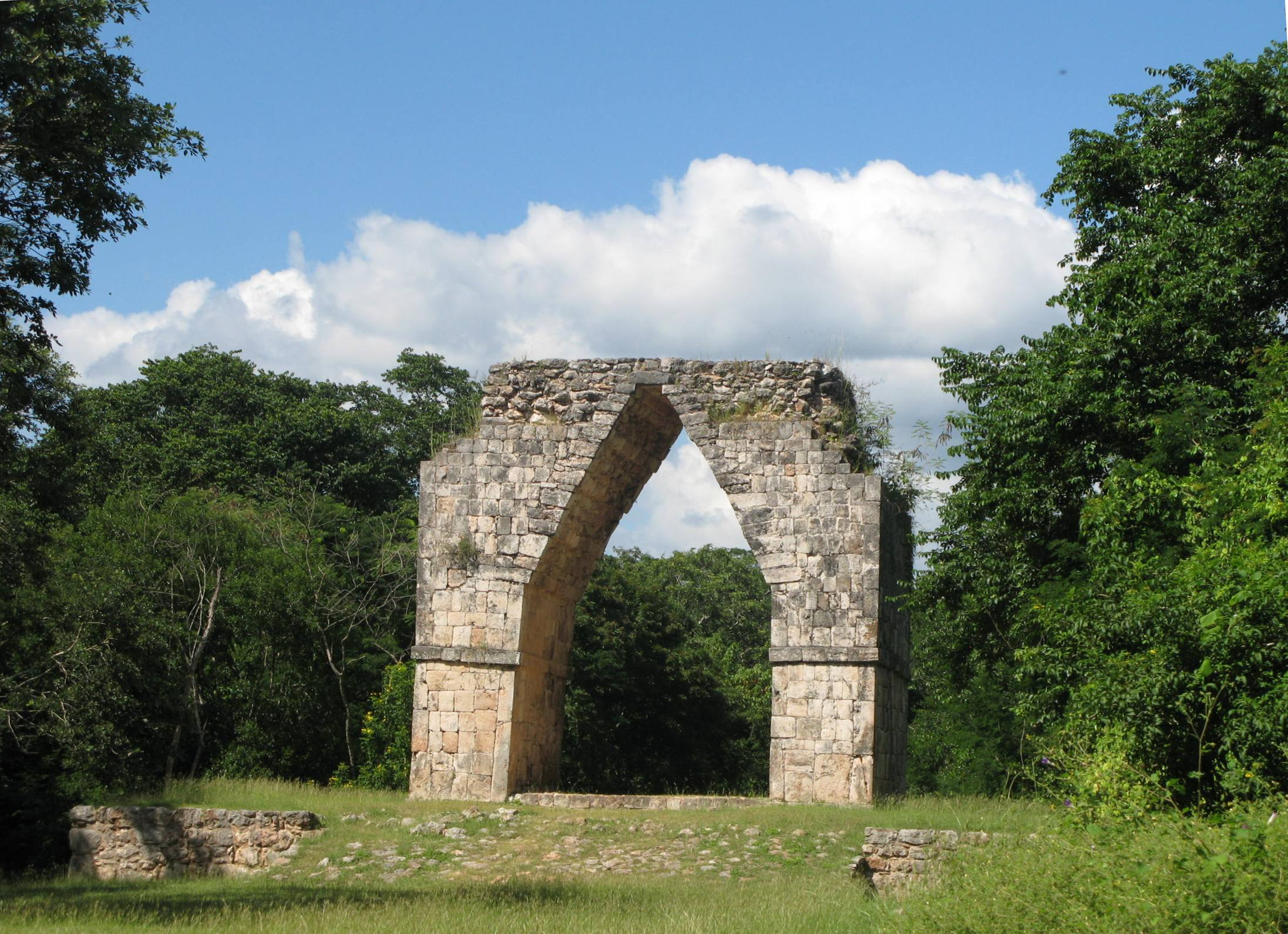 Slavolok na poti Calakmul - Kabah, Mehika.